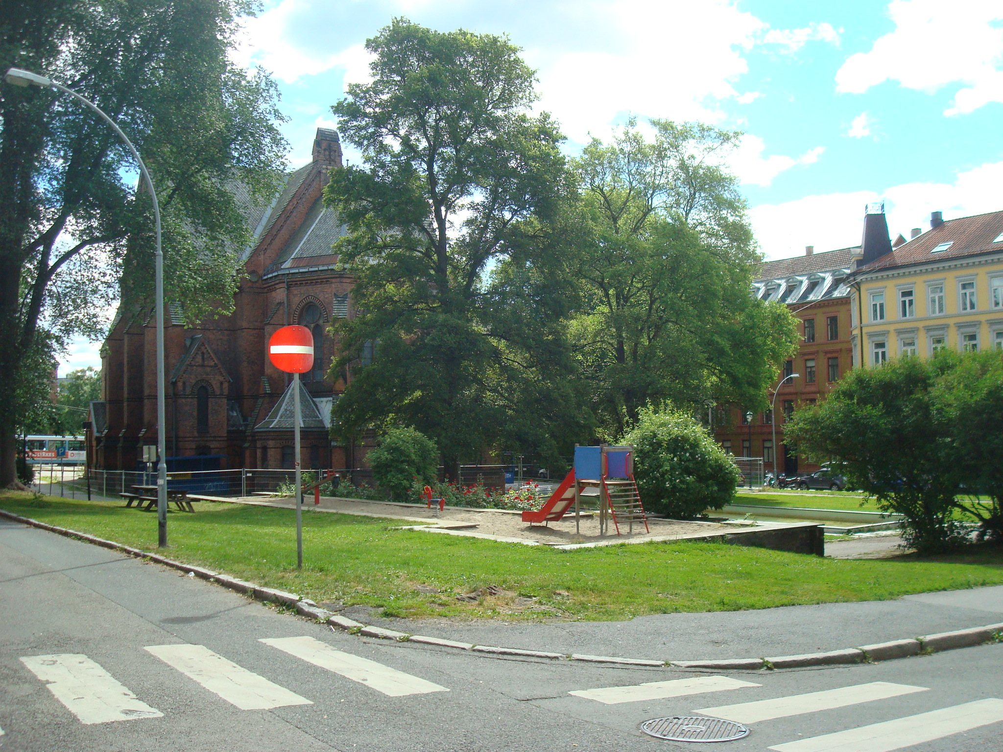 Paulus' plass i Oslo.